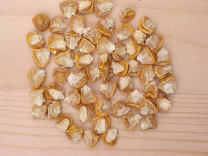 Zaad van extra zoete suikermais